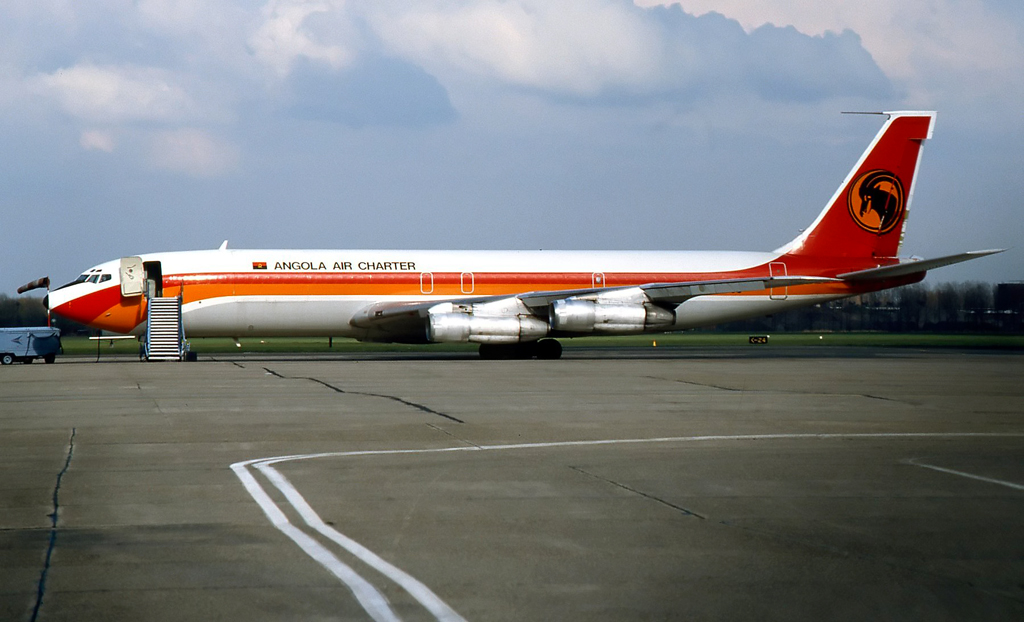 D2-TOV B707 Angola Air Charter Rotterdam 1980s